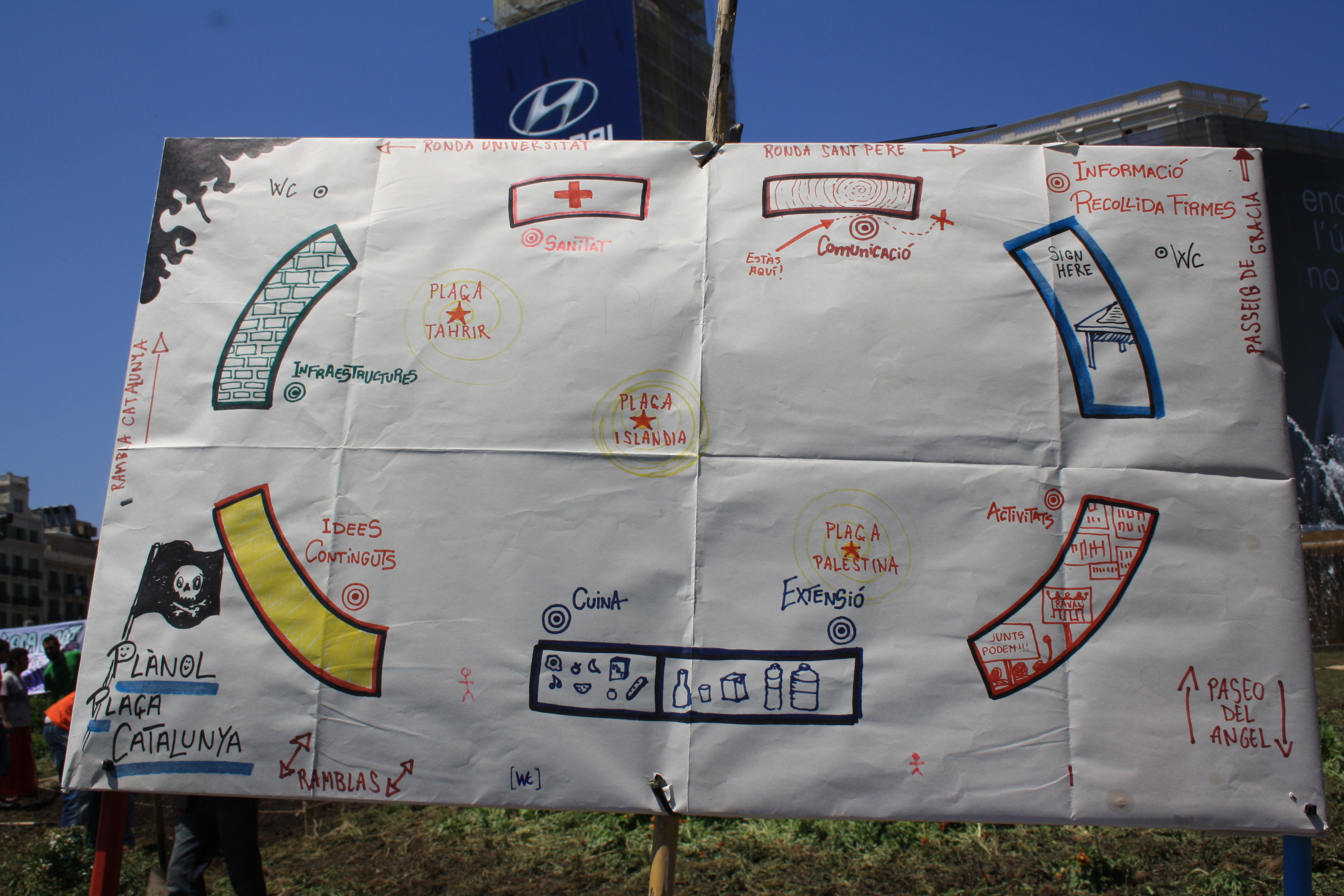 Plaça de Catalunya, Barcelona, 21 de maig de 2011